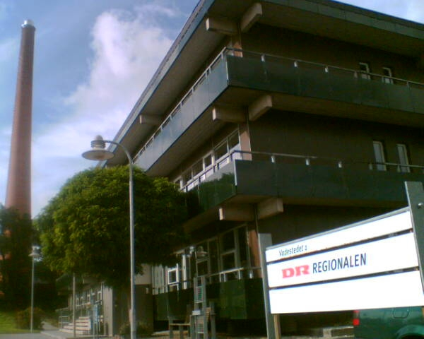 DR Regionalen - nu DR Sjælland - i Næstved. Picture by me.